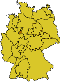 Lippische Landeskirche